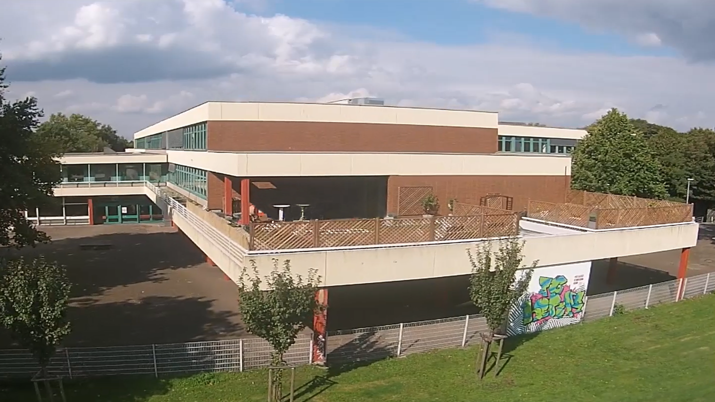 Luftaufnahme der Südseite des Pestalozzi-Gymnasium Herne, Dachterasse, Zweiter Haupteingang (links)